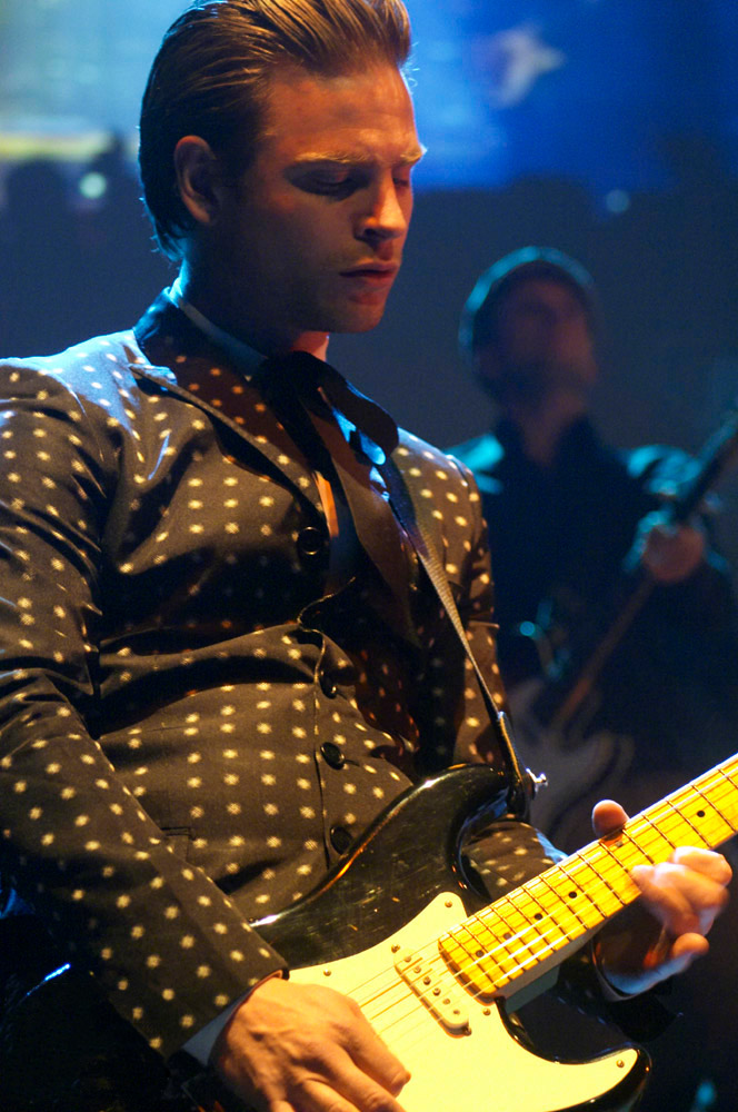 Peter Svensson in The Cardigans, 2006